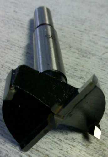 Bosch 35mm diameter hinge sinker. Tungsten Carbide